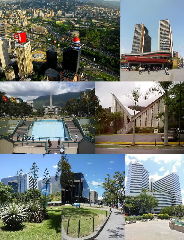 Imágenes de Caracas Venezuela